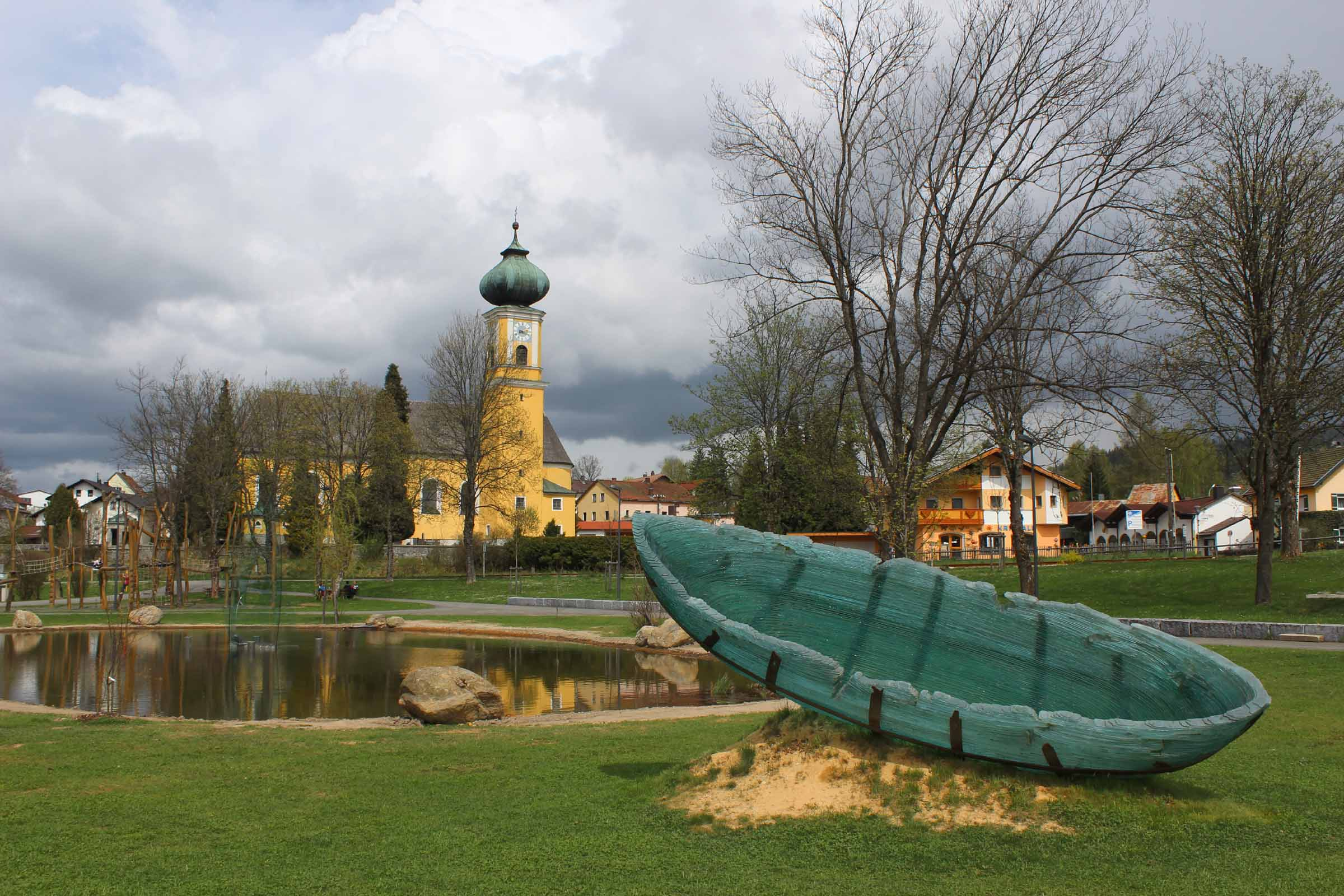 Glasmuseum